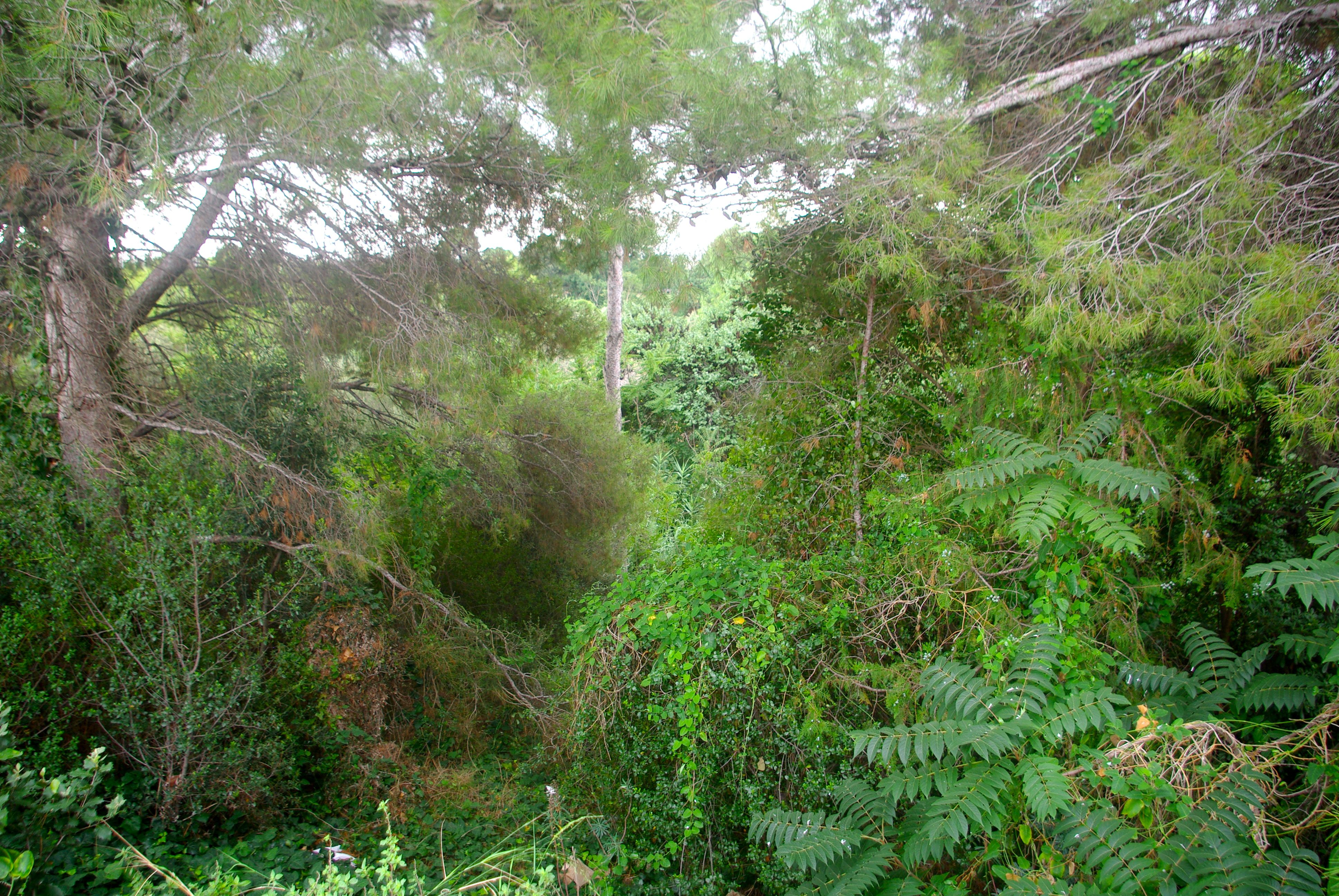 El Barranc de Calderons quan passa sota la carretera de Castellvell, al terme de Reus